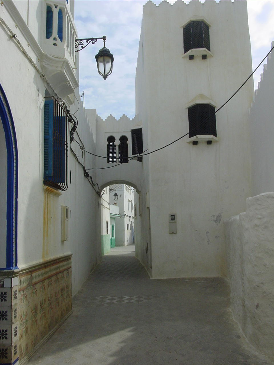 No interior da cidade antiga de Asilah (Arzila).